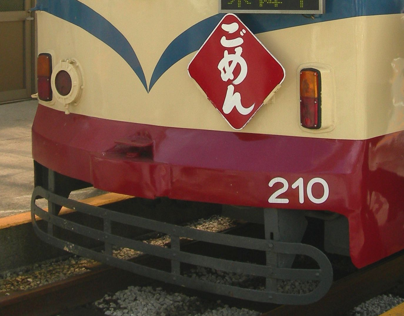 土佐電気鉄道 後免町駅行き電車の前サボ